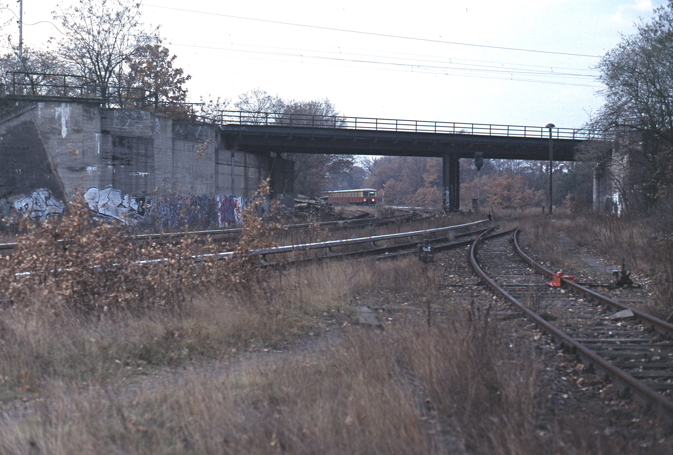 Strecke nach Spindlersfeld, Unterfahrung des Berliner Außenrings